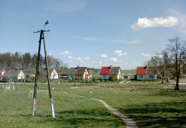 Mołtowo. Widok ogólny na dolną część wsi.